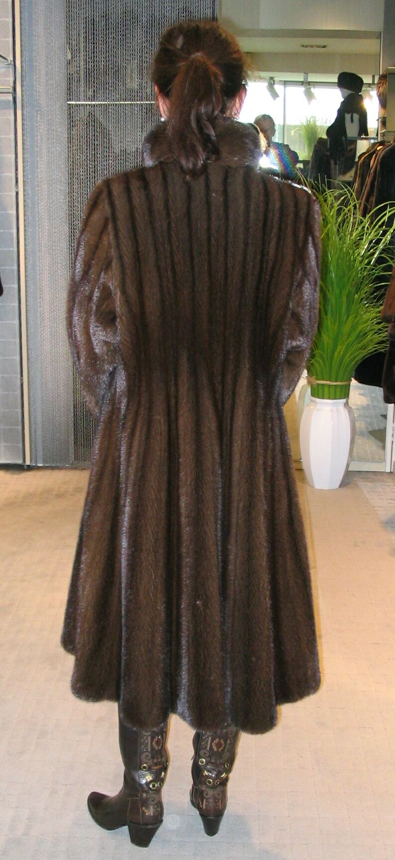 Lunaraine Mink coat